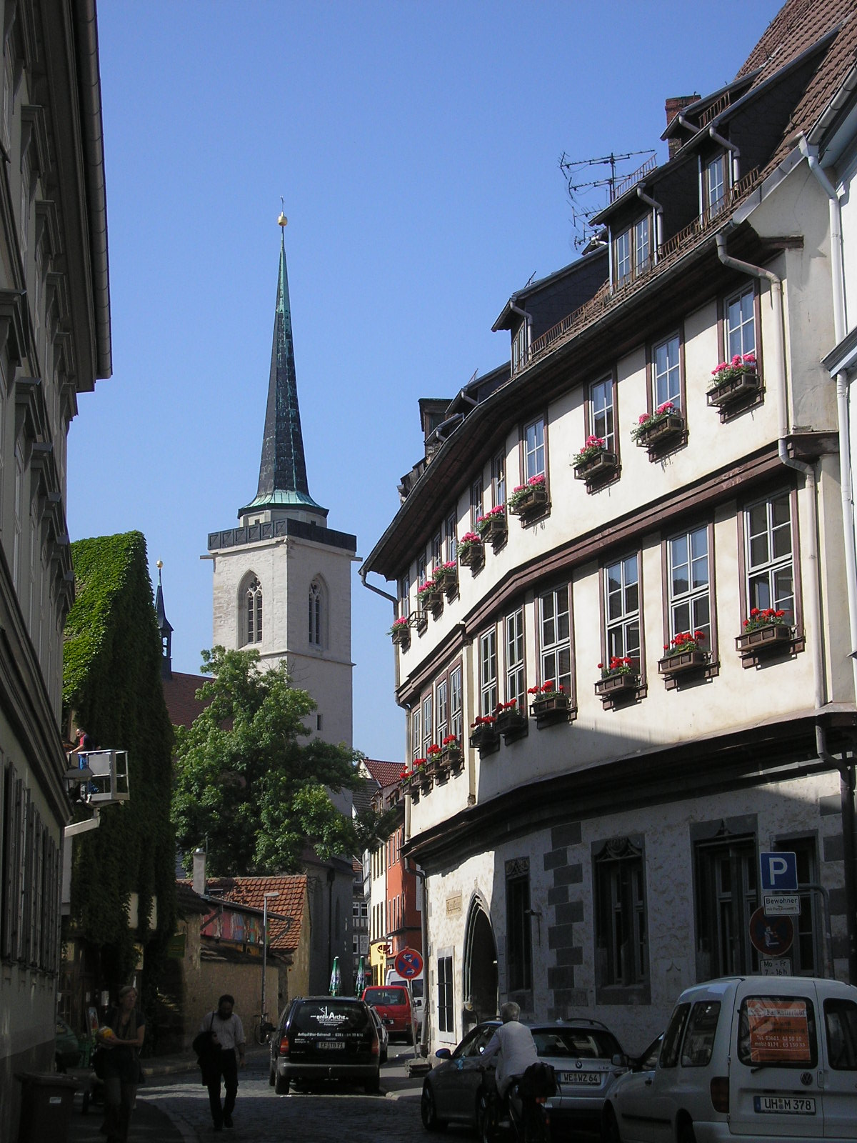 Blick durch die Allerheiligenstraße in Erfurt.